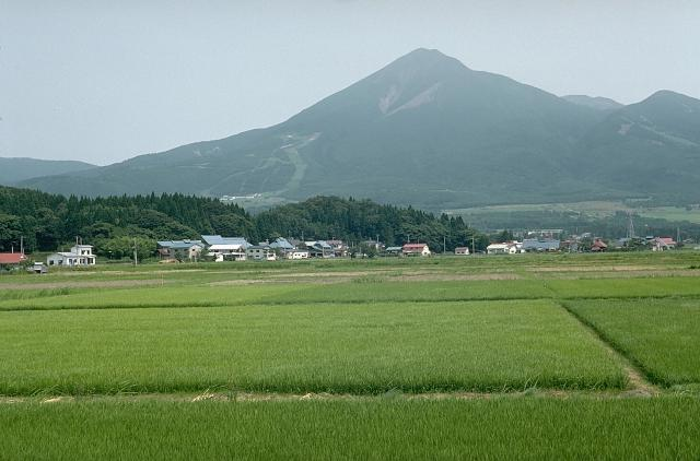 Bandai volcano